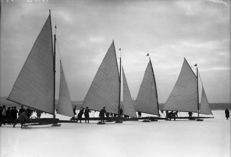 Eissegeln auf dem Müggelsee